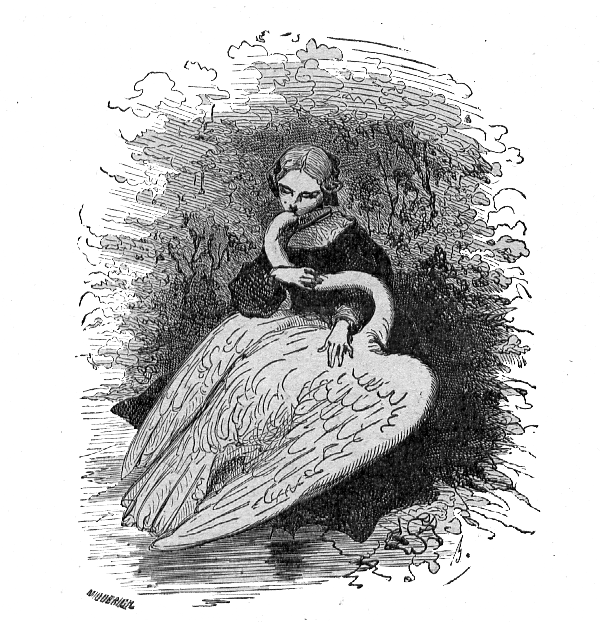 Pour la source voir : Discuter:Contes d'Andersen Vignette de Les Cygnes sauvages par Bertall représentant la princesse Élisa qui embrasse cygne (son frère).